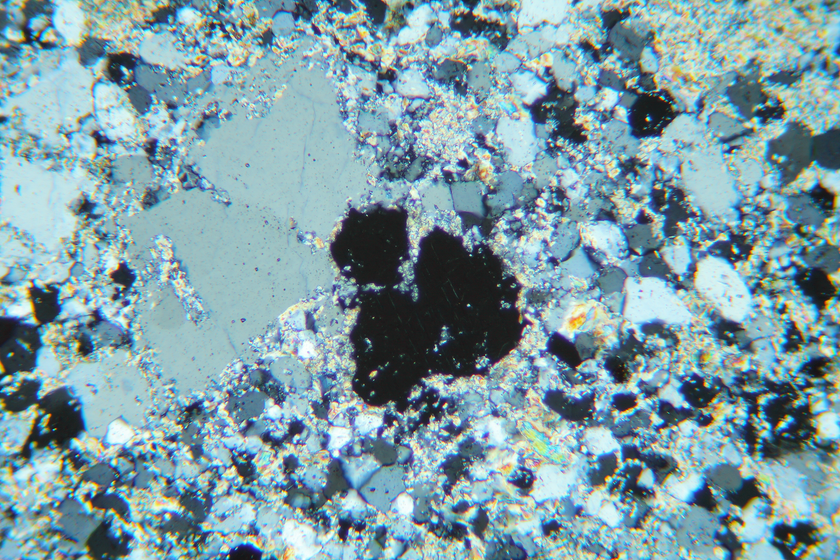 Fluorit (Dünnschliff, XPL) in einem Greisen (Sadisdorf, Erzgebirge): Als optisch isotropes Mineral bleibt Fluorit unter gekreuzten Polfiltern dunkel